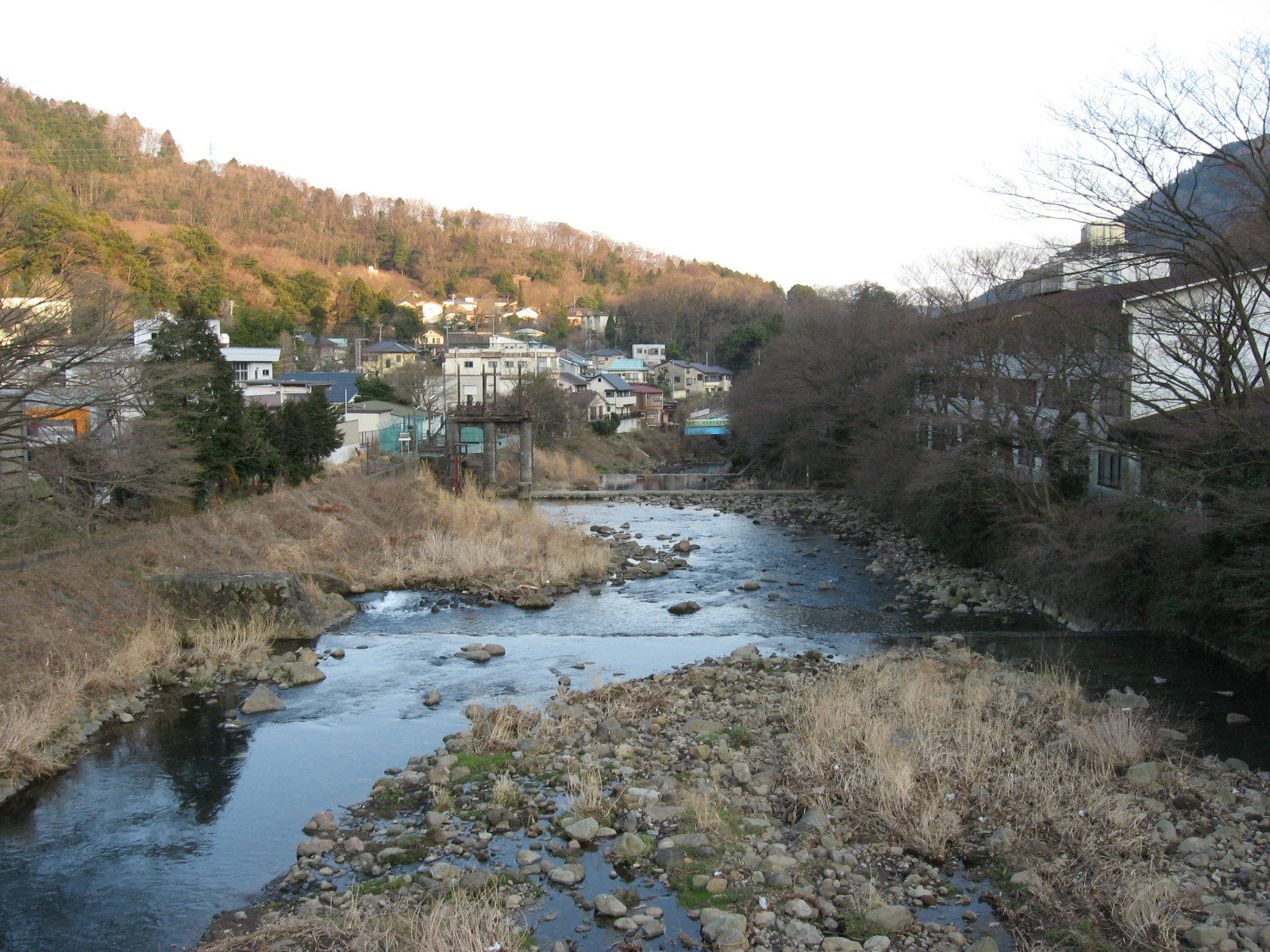 強羅駅付近より早川